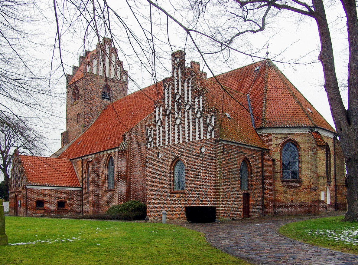 fra sydøst